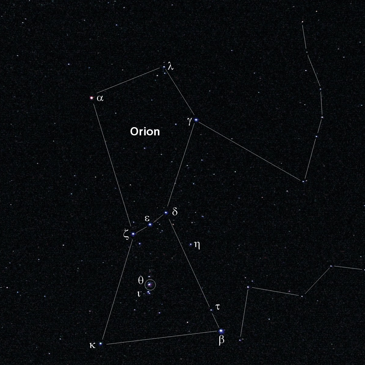 Sternbild Orion, fotografiert mit 35mm Weitwinkel, 15 Sekunden, Blende 2,0, Canon G5